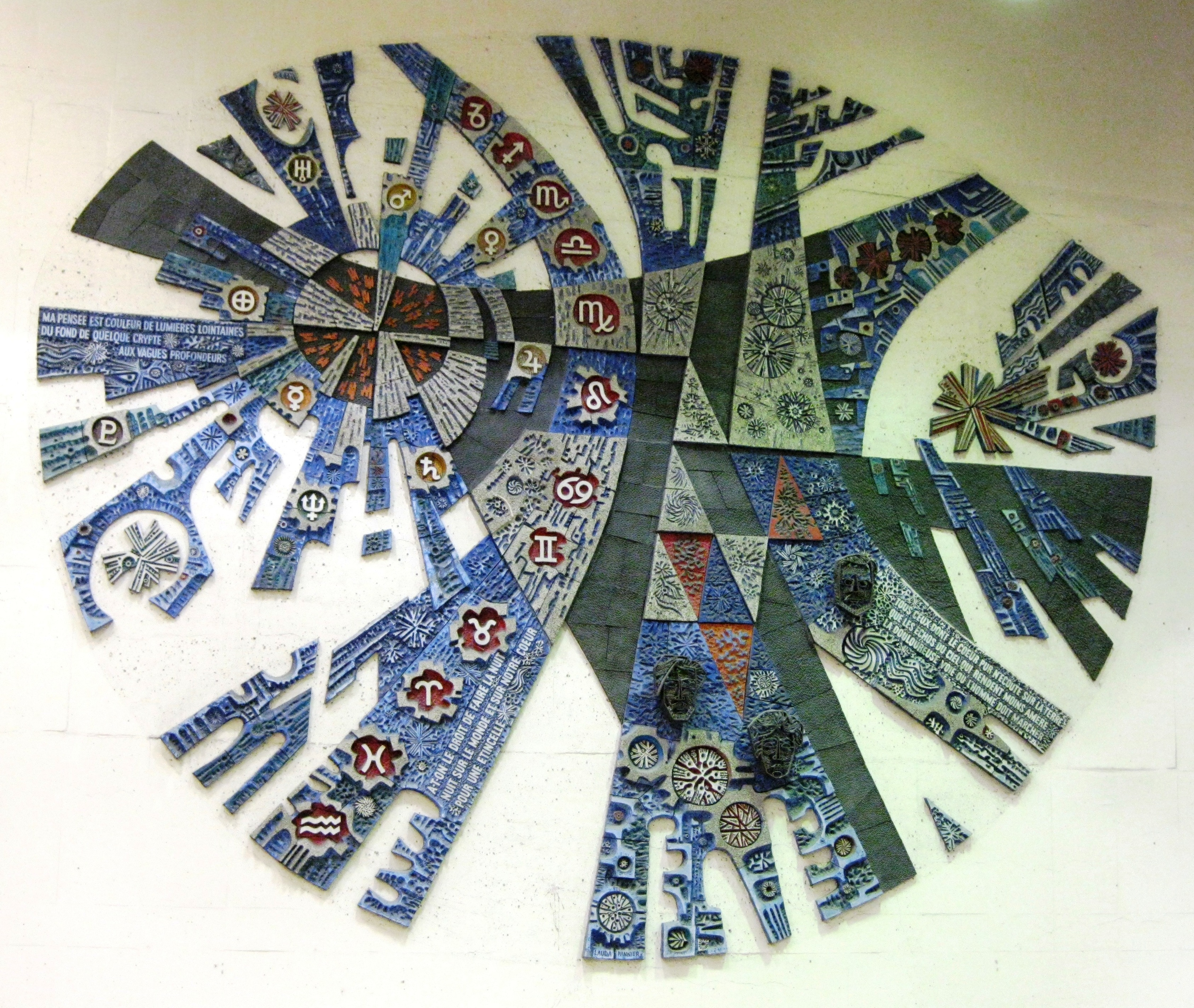 Le Poète dans l'univers, murale de Georges Lauda, Paul Pannier et Gérard Cordeau, est un bas-relief situé à la station de métro Crémazie. Info